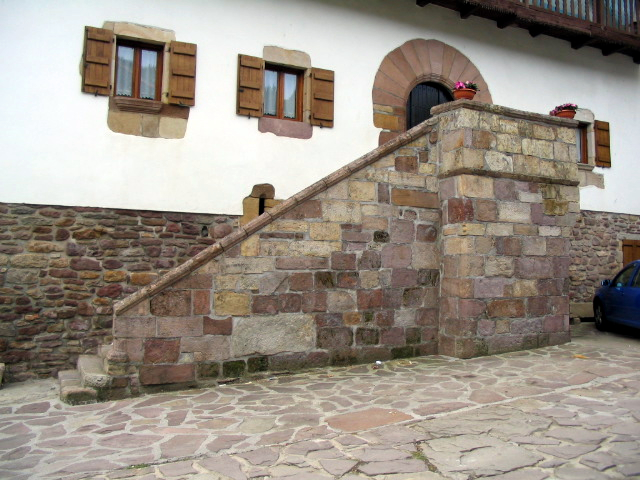 Place de Zubieta (Navarre) (Pyrénées).